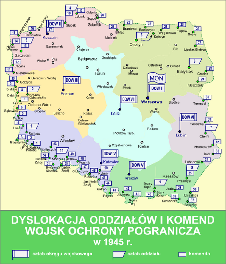 Dyslokacja oddziałów i komend Wojsk Ochrony Pogranicza w 1945 r.